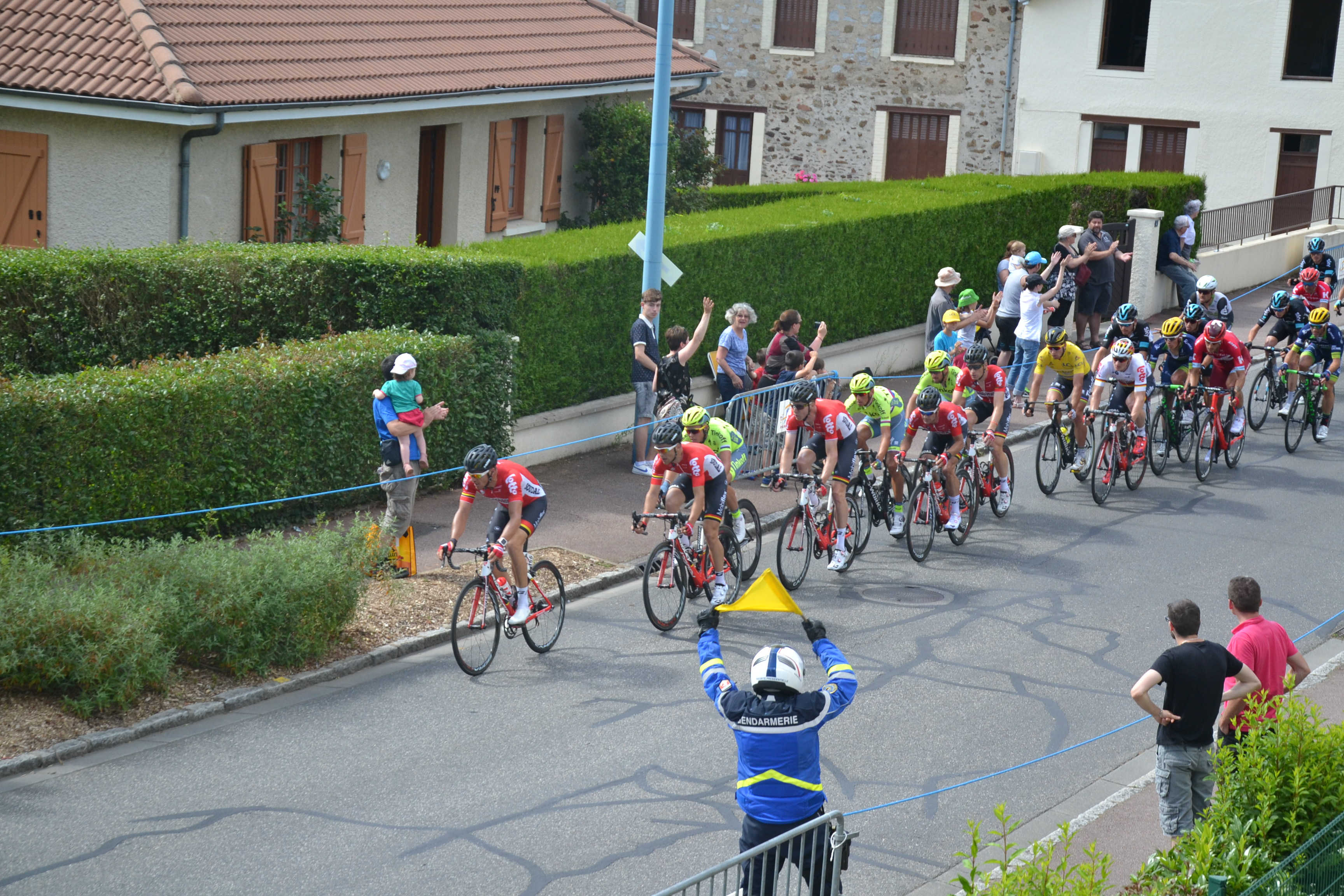 Passage du Tour de France 2016 à Panazol (Haute-Vienne, France), 4e étape.